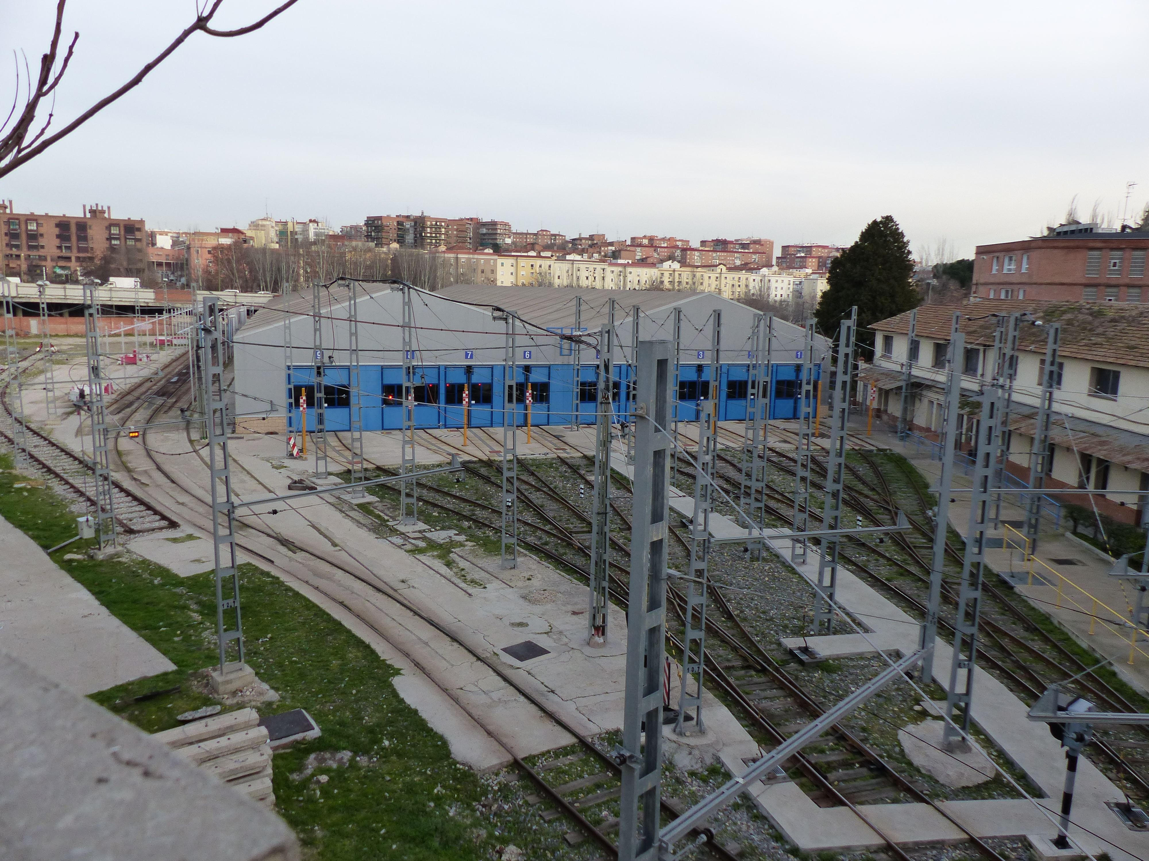 Depósito de Ventas